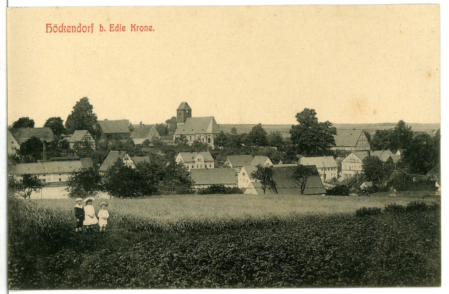 Höckendorf; Blick auf Höckendorf This postcard is from publisher Brück & Sohn in Meißen ( postcard has a unique number 11039 and is available in a higher resolution at the publisher. This images was uploaded in a cooperation project between Wikipedians and the publisher.